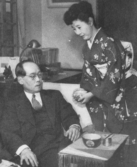 湯川秀樹・スミ夫妻